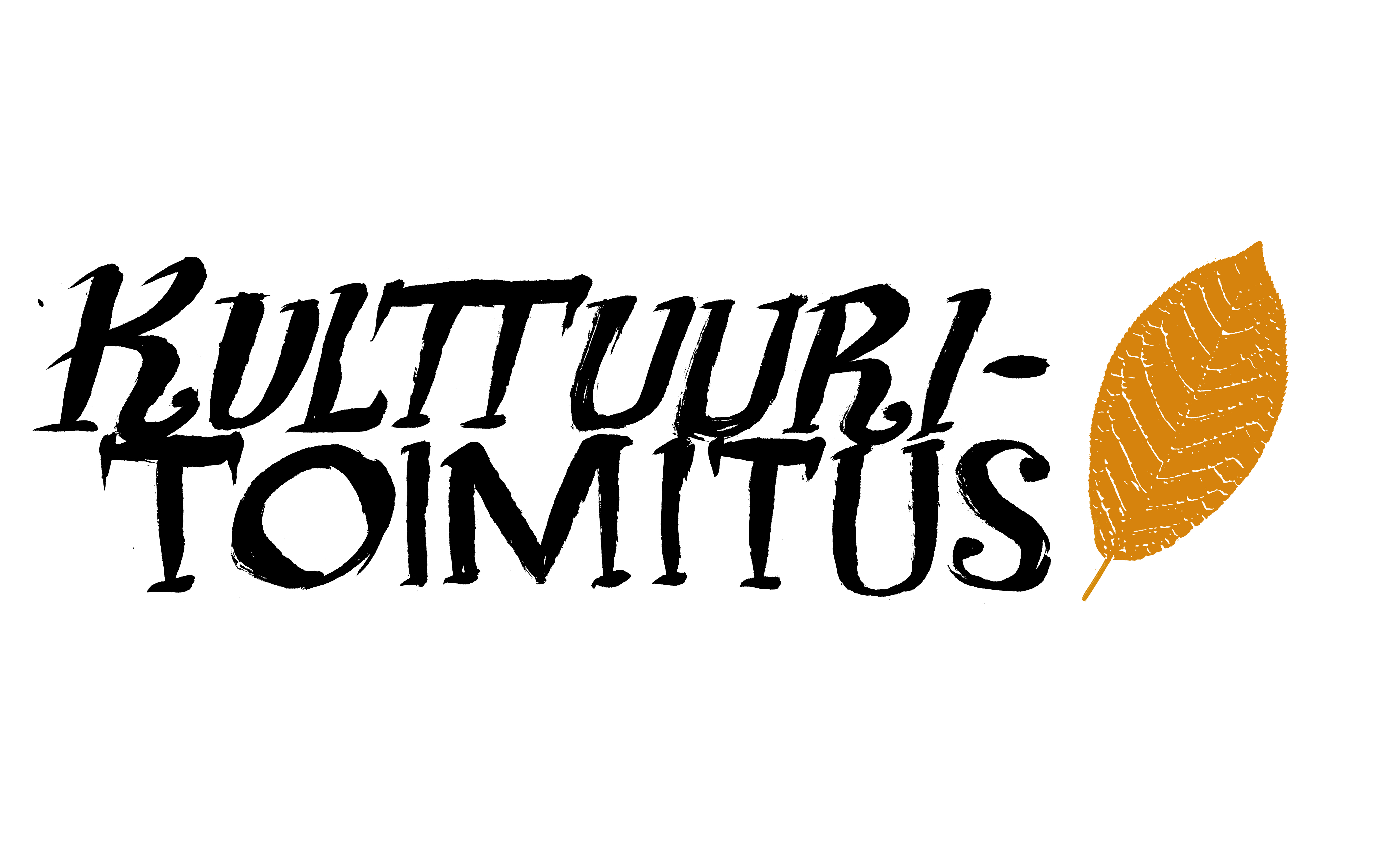 Ville Pirisen suunnittelema Kulttuuritoimitus-julkaisun logo